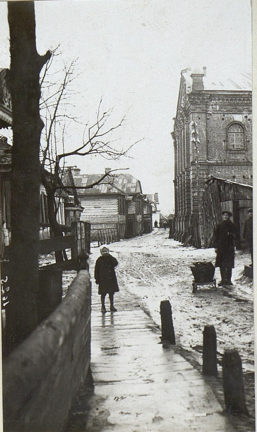 Ковель во время первой мировой войны, справа - Большая синагога.